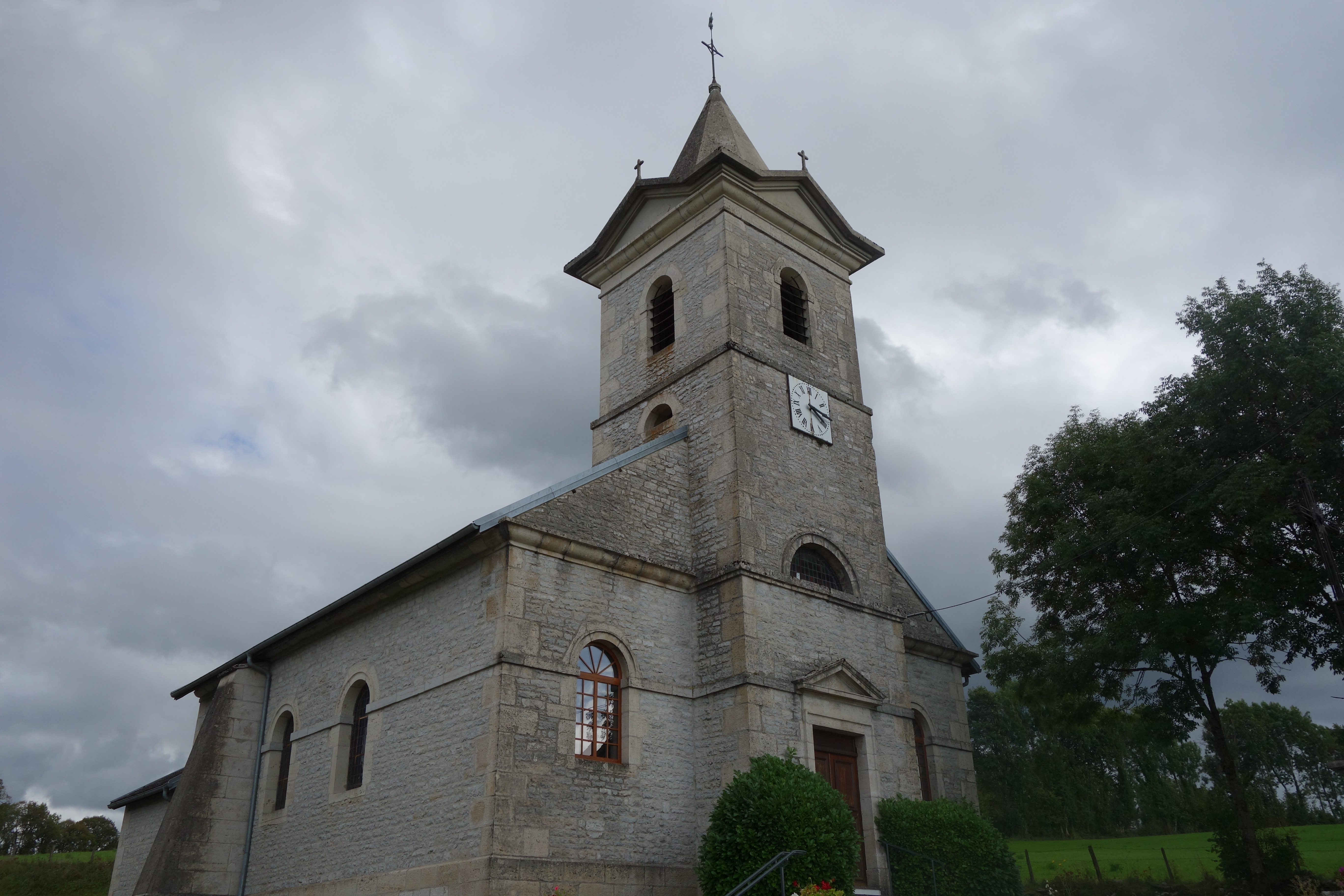 Denézières - Jura - église